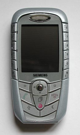 Siemens SX1, Smartphone, fotografiert von Mwka png-Photo aus dem Artikel von beinahe 0,5MB nach JPEG konvertiert.